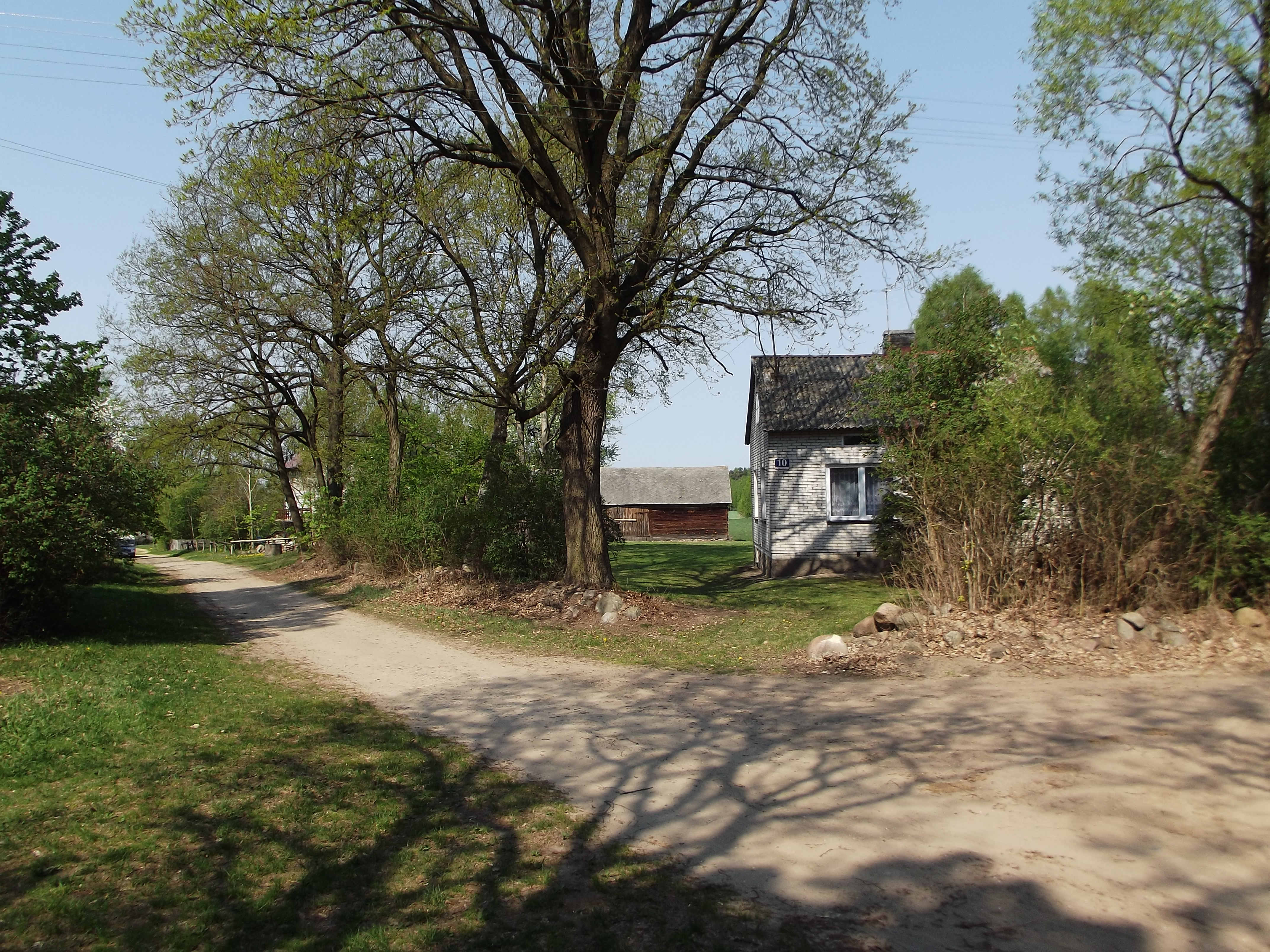 Kazimierzów-centrum wsi